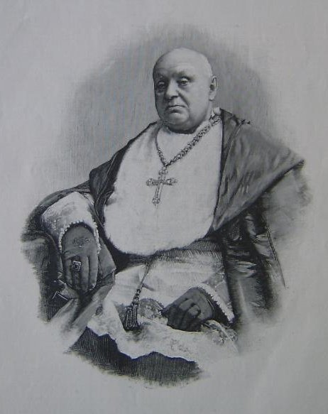 Antolín Monescillo Viso como Arzobispo de Toledo. Año 1897.